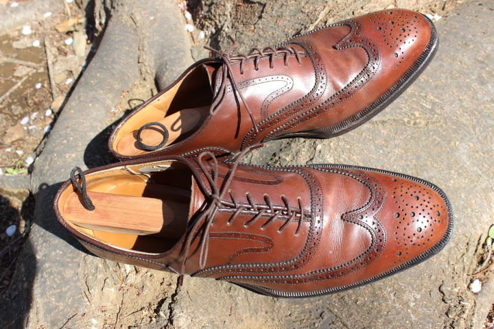 ジョンストン＆マーフィー（REGAL製）のフルブローグシューズ